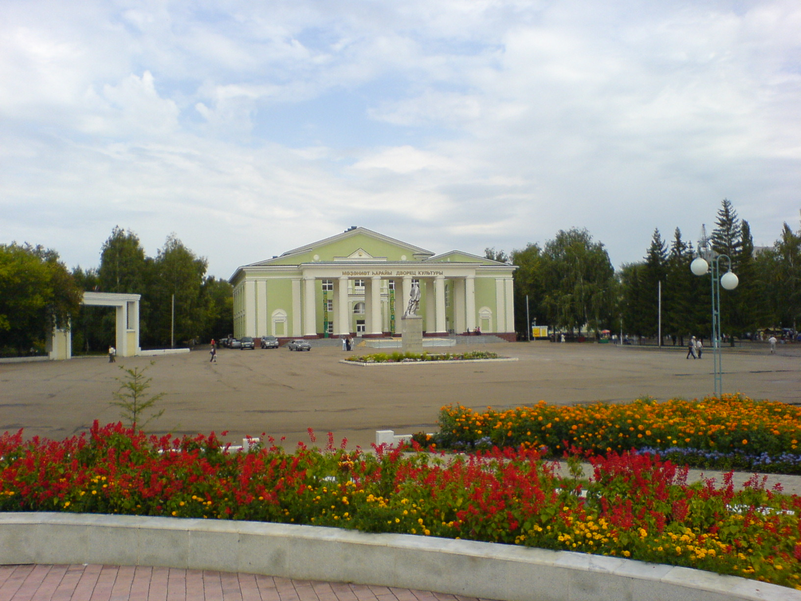 Ишимбай